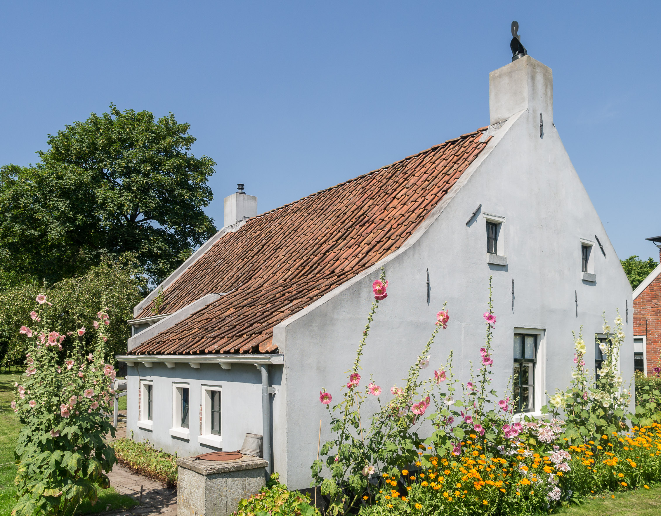 Blauhoes . Deze woning uit omstreeks 1850 is afkomstig uit Den Andel. Het huis is ingericht als een drukkerij uit de eerste helft van de 20ste eeuw.